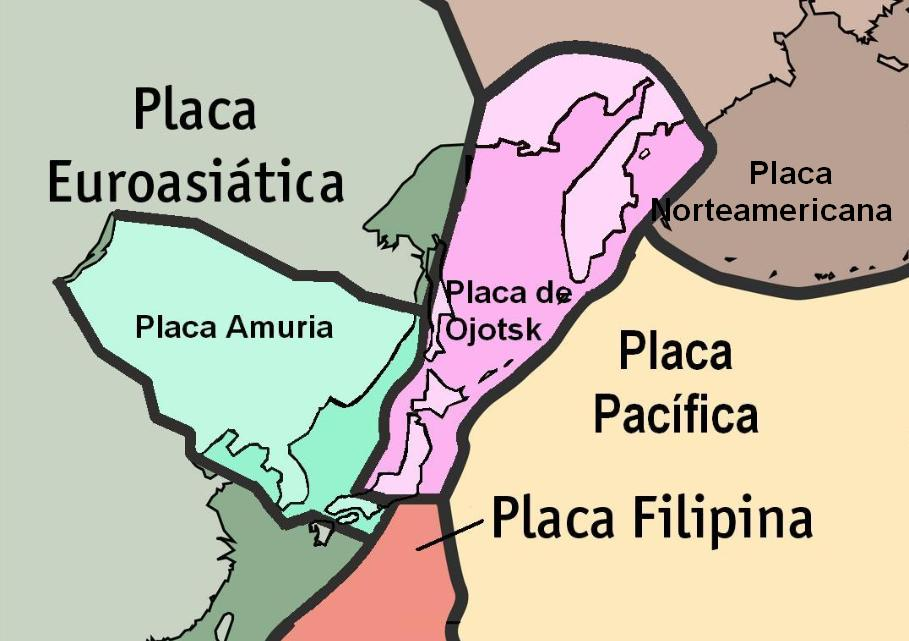 Detalle de las placas de Ojotsk y Amuria